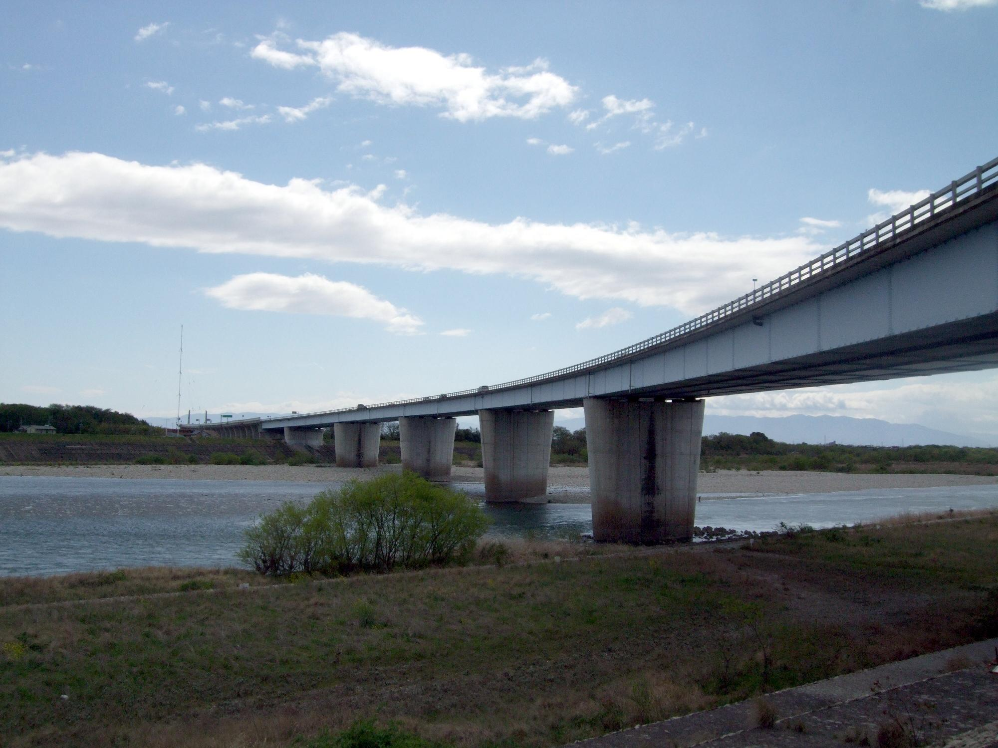 東海北陸自動車道 木曽川本川橋（川島PA付近・名古屋方面を撮影） 2008.4.19 投稿者が撮影